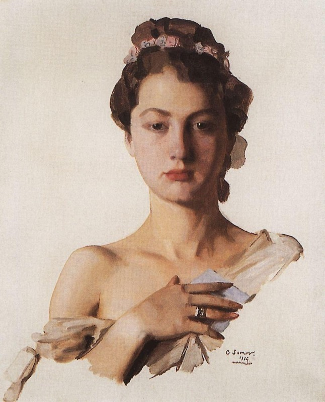 Портрет Александры Левченко. 1934